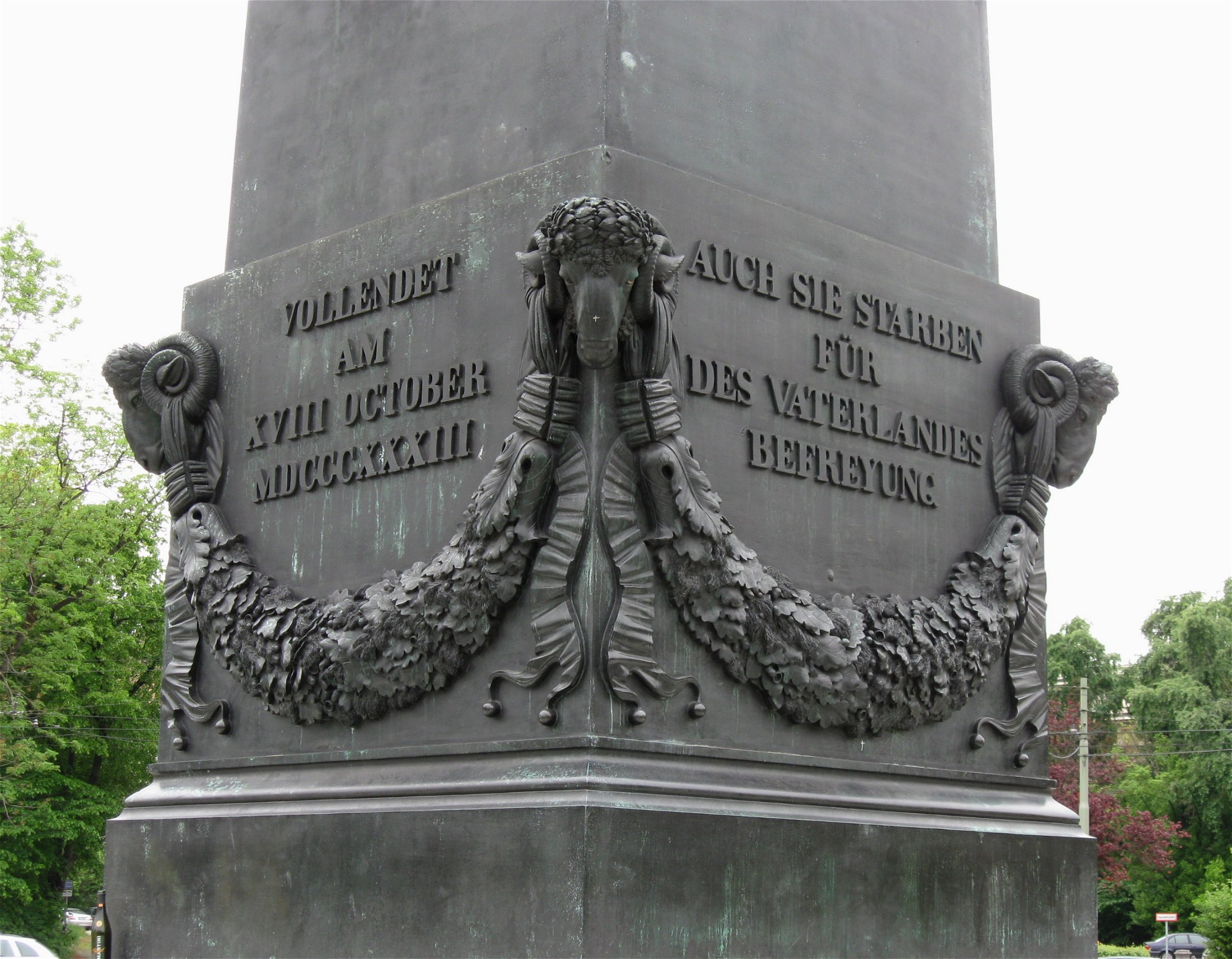 Obelisk am Karolinenplatz (Detail), München